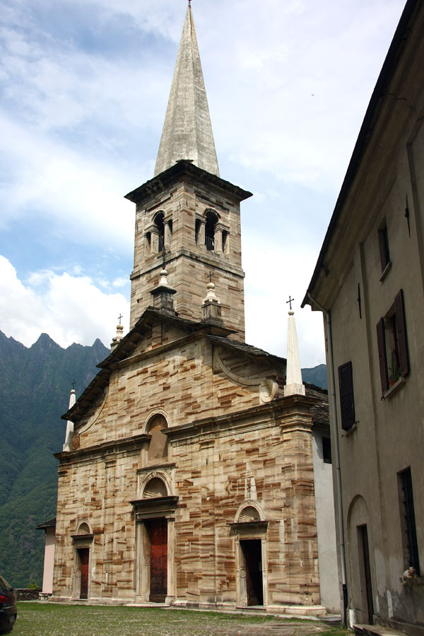 Chiesa Parrocchiale di San Nicolao a Ornavasso (VB)